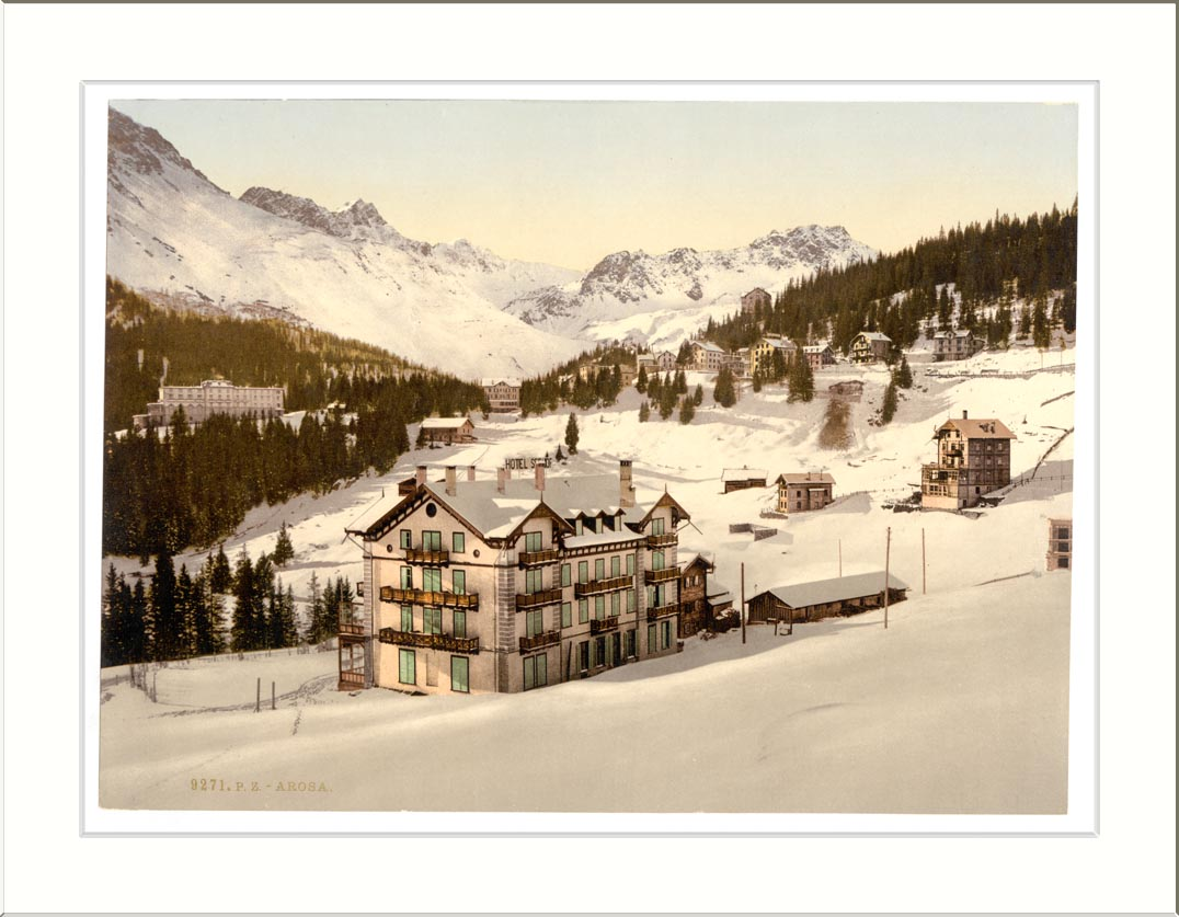 Arosa in winter Grisons Switzerland